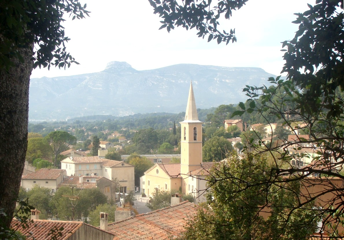 Le bourg de Gémenos et le massif du Garlaban.